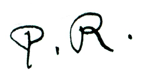 Monogramme du poète français Pierre Reverdy. Scan d'après correspondance. Cette image ou le texte qui y est représenté est seulement composé de formes géométriques simples et de texte. Elle n’atteint pas le seuil d'originalité nécessaire pour la protection du droit d’auteur, et est donc du domaine public.